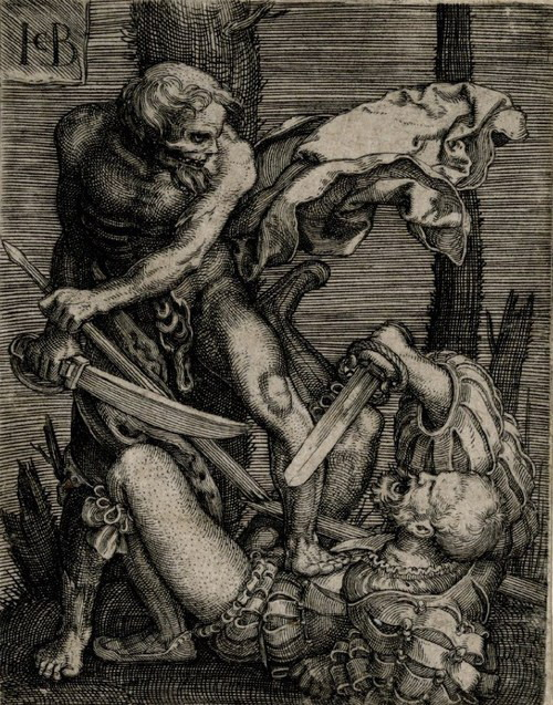 Якоб Бінк Смерть і ландскнехт.jpg: гравюра 16 ст.